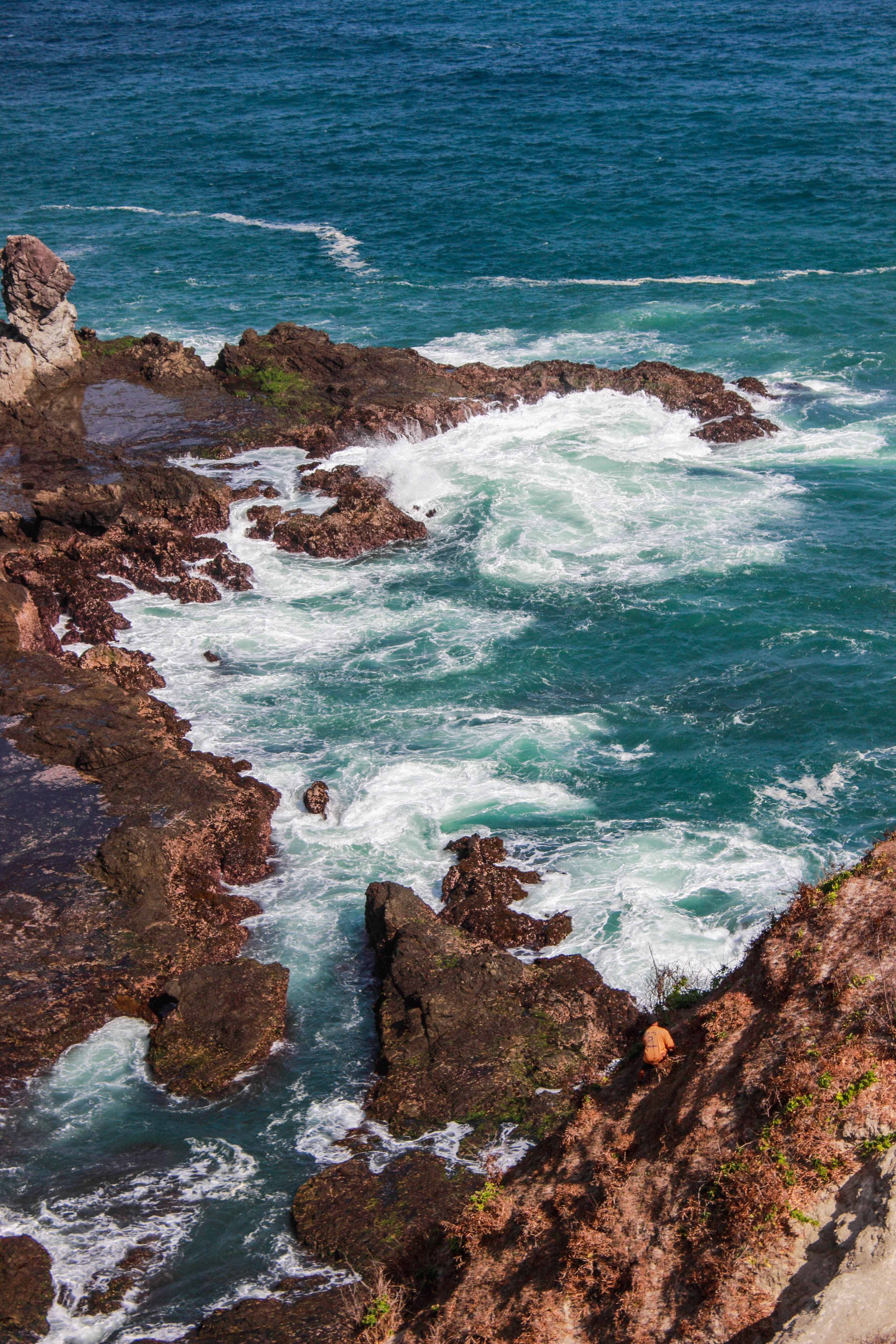 Penduduk sekitar sedang mencari rumput di tebing batuan beku vulkanik di bagian barat pantai Siung, Yogyakarta. (kanan bawah). Di sepanjang pantai Siung hingga pantai Wediombo terdapat formasi batuan yang cukup unik, tidak seperti di pantai-pantai lainnya di Gunungkidul yang berupa batu kapur, namun di sepanjang pantai ini terdapat batuan beku yang diyakini sisa dari gunung api purba yang berada di dekat pantai tersebut.